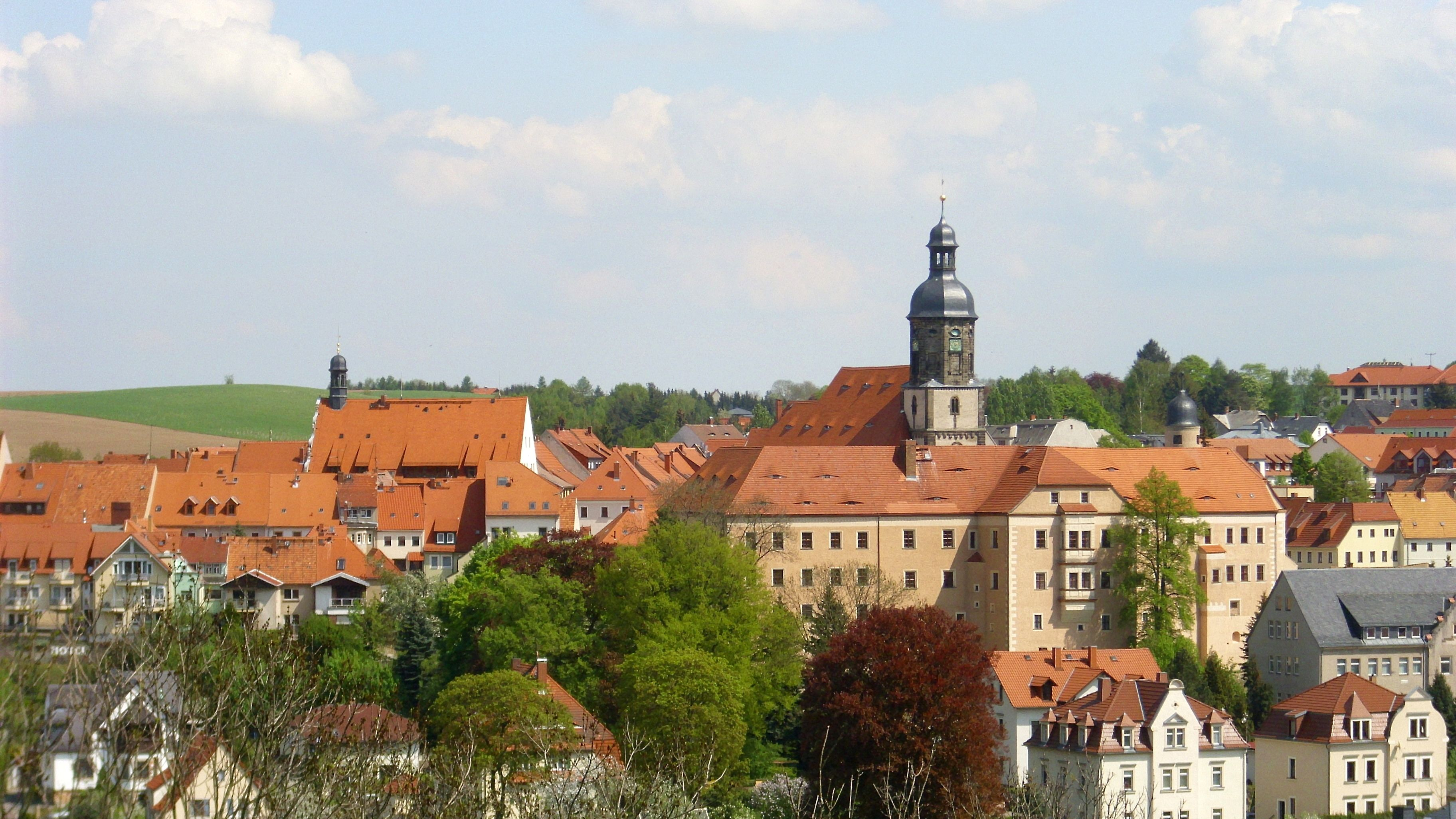 Blick von der Reichstädter Höhe im Westen von Dippoldiswalde auf die Stadt - Denkmalschutzgebiet Altstadt Dippoldiswalde.